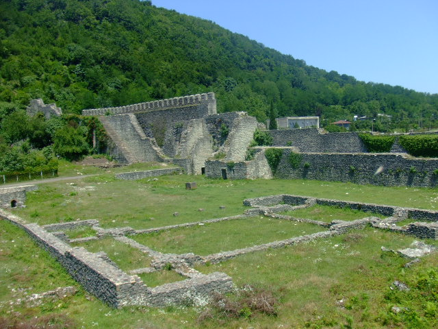 Nokalakevi